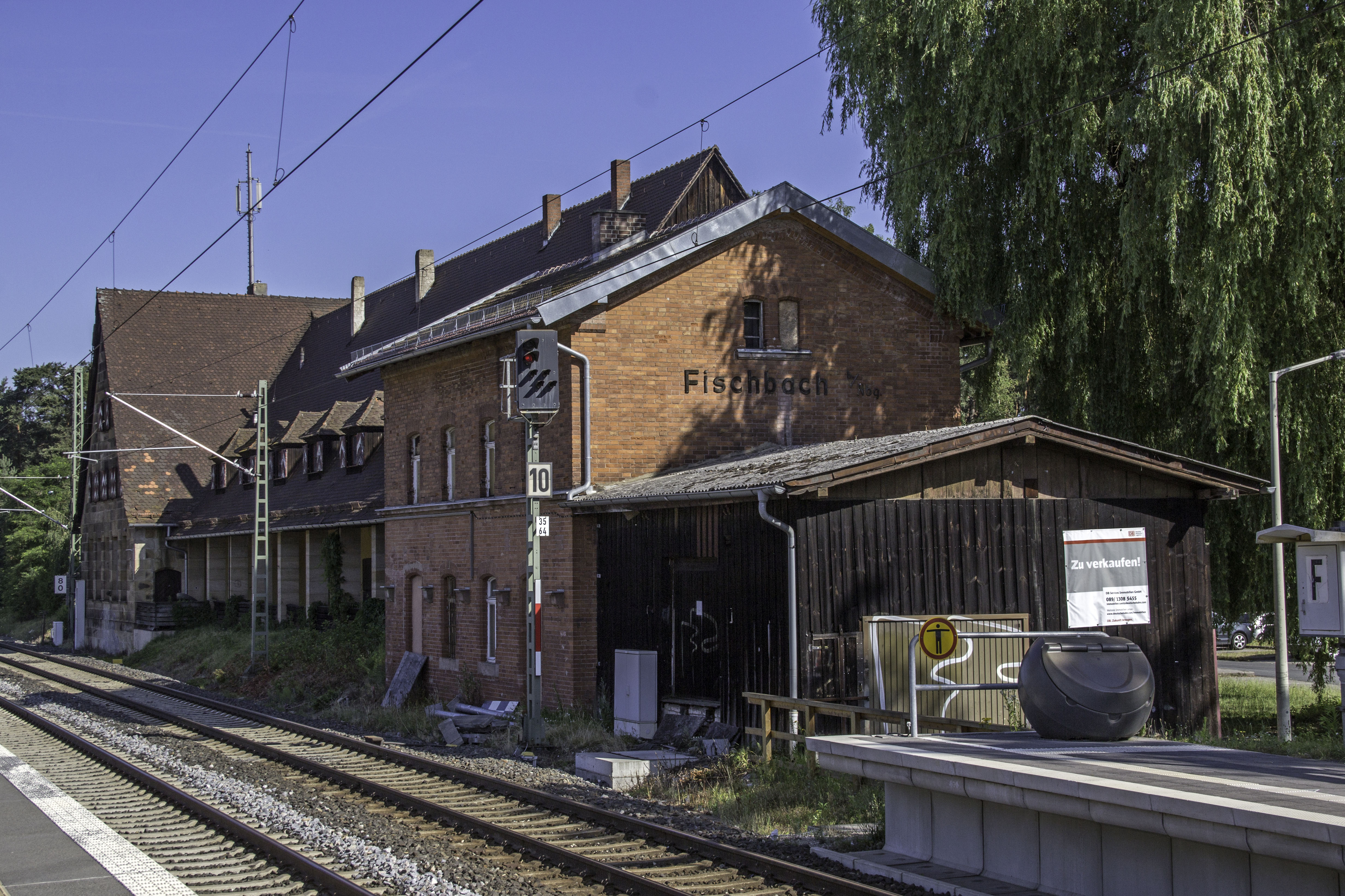 Bahnhof Fischbach